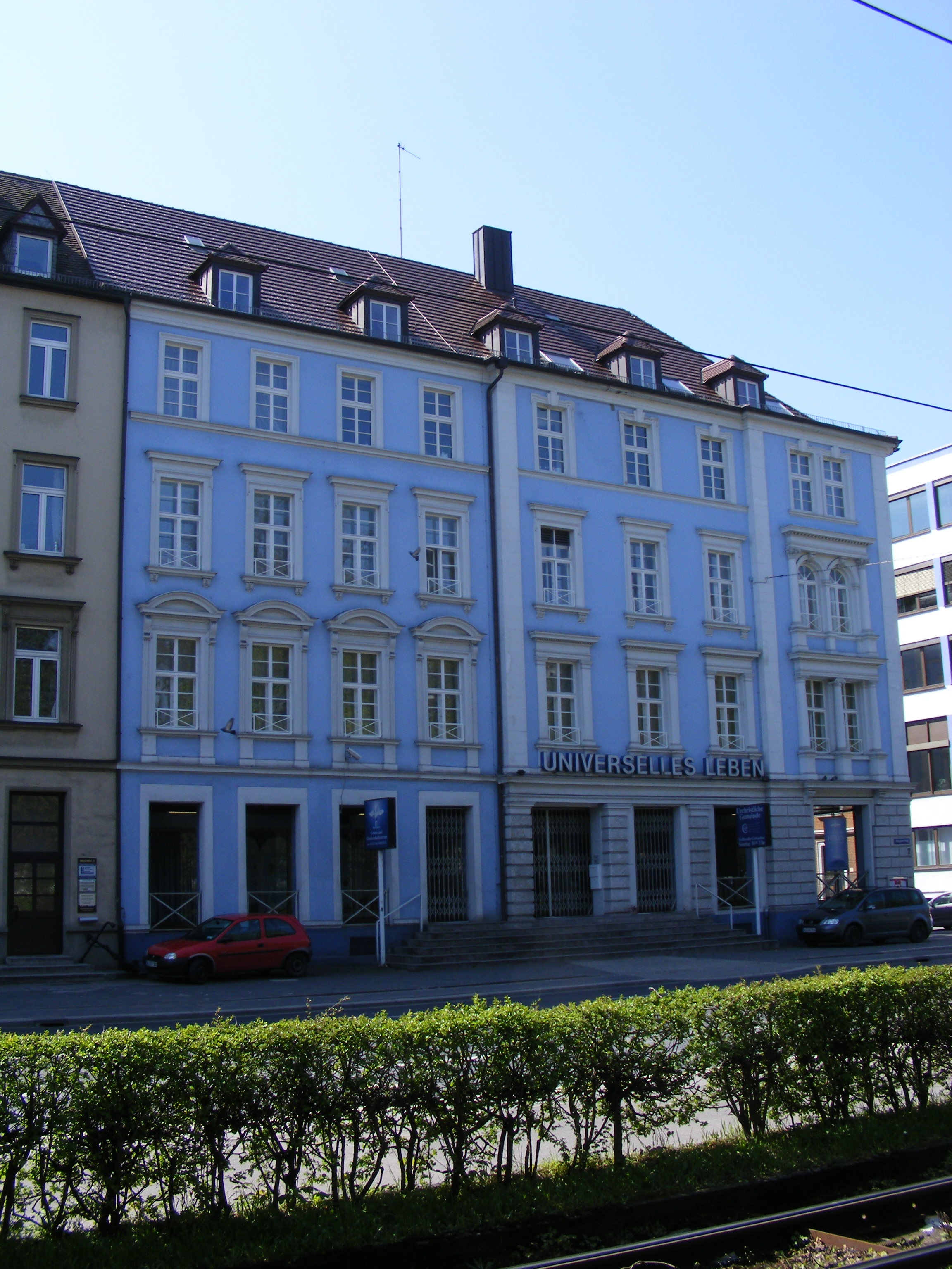 Würzburg - Gebäude "Universelles Leben".